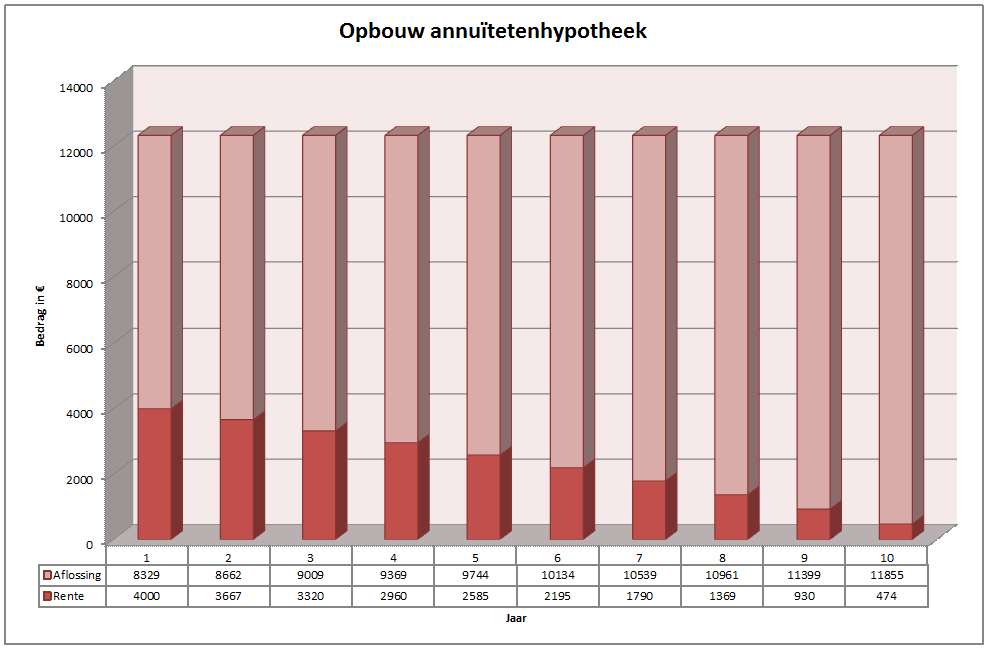 Opbouw van een annuïteitenhypotheek met €100.000 geleend voor 10 jaar tegen 4%.